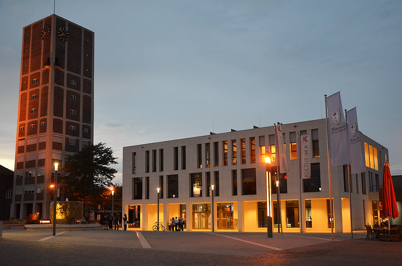 Am Abend der Eröffnung der WikiCon 2016 im Kultur- und Kongresszentrum Das K in Kornwestheim wehten - wie hier ganz rechts zu sehen - zwei Fahnen mit dem Logo der Wikipedia vor dem Veranstaltungsort, während der Rathausturm rötlich angestrahlt wurde ...